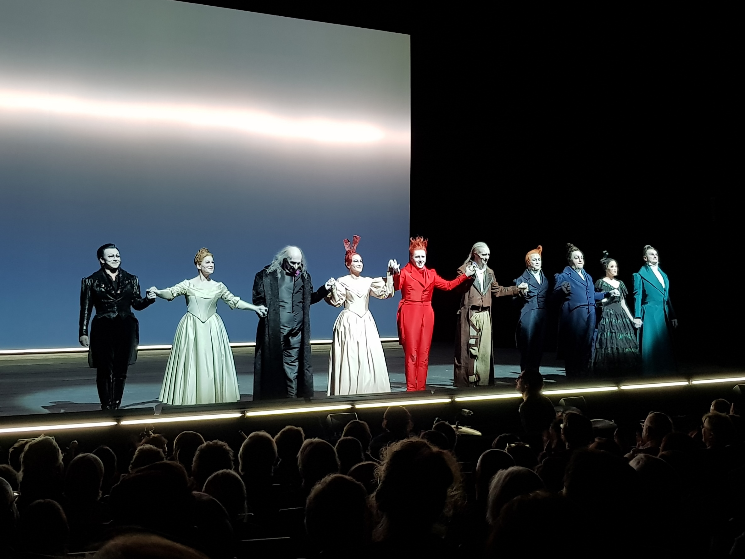 "Der Sandmann"-Inszenierung 2017 im Düsseldorfer Schauspielhaus (v.l.n.r.): Spalanzani, Clara, Coppola/Coppelius, Mutter, Nathanael, Sandmann, Lothar, Siegmund, Olimpia, Vater